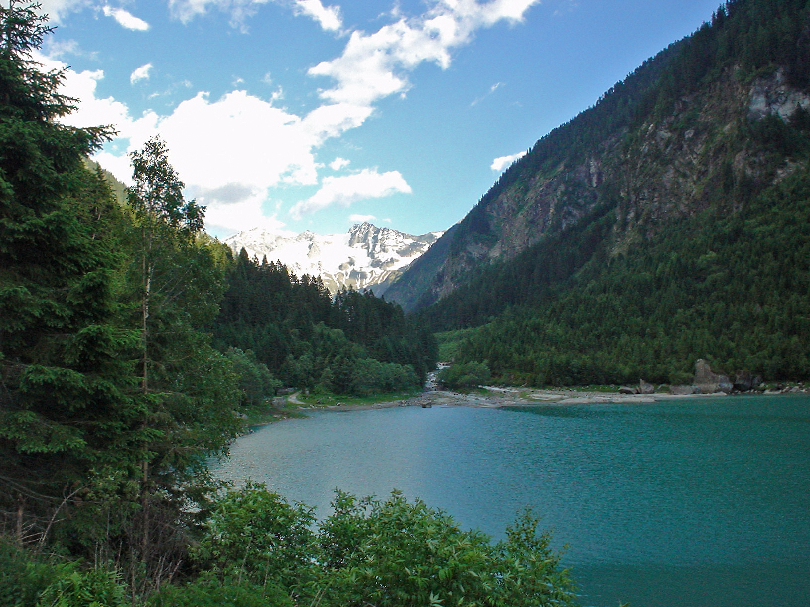 Blick auf die Mündung der Stillup ind den Speichersee.